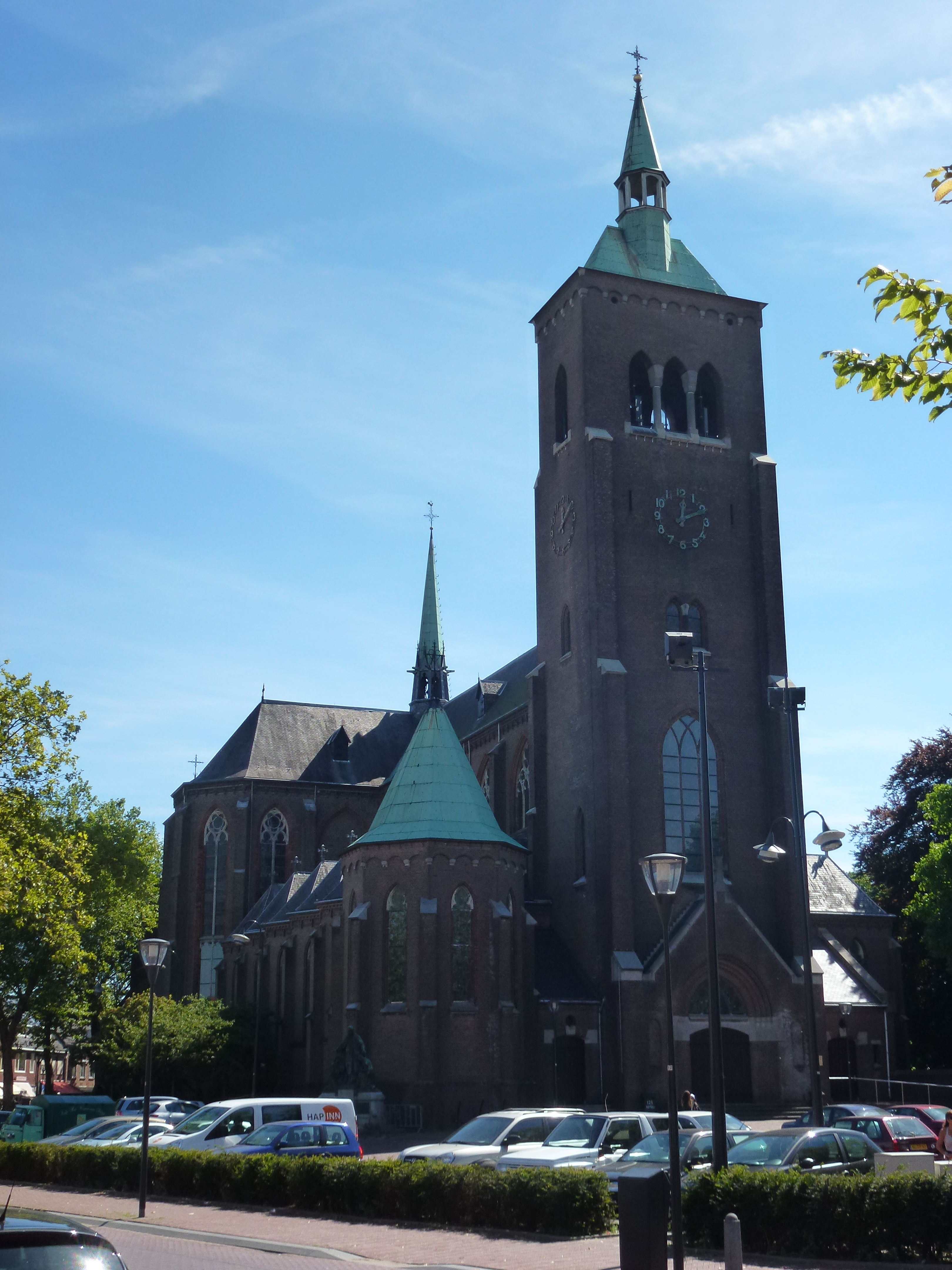 St Trudokerk Strijpsestraat 129 Eindhoven